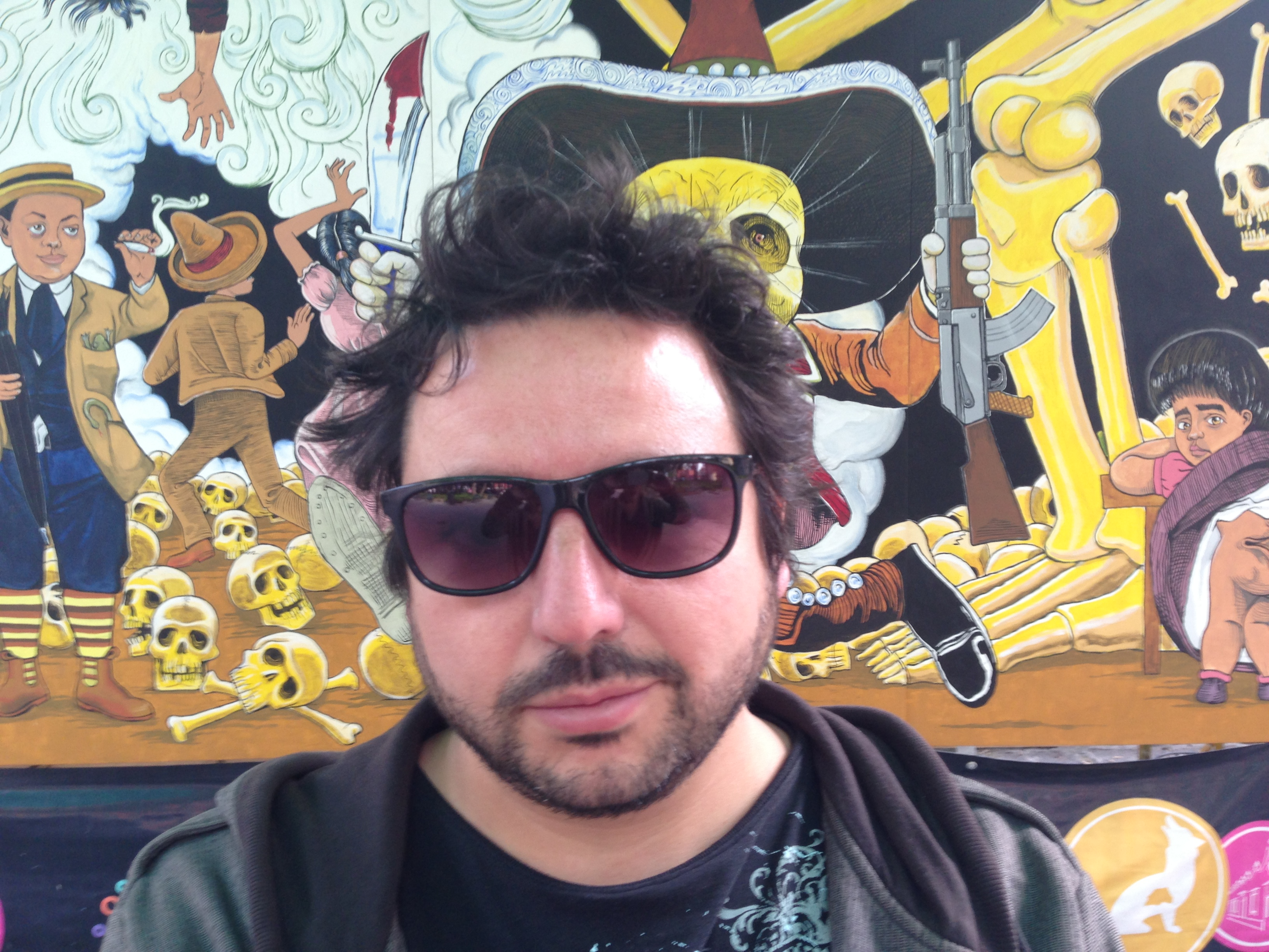 El escritor chileno Galo Ghigliotto en Coyoacán, 2013